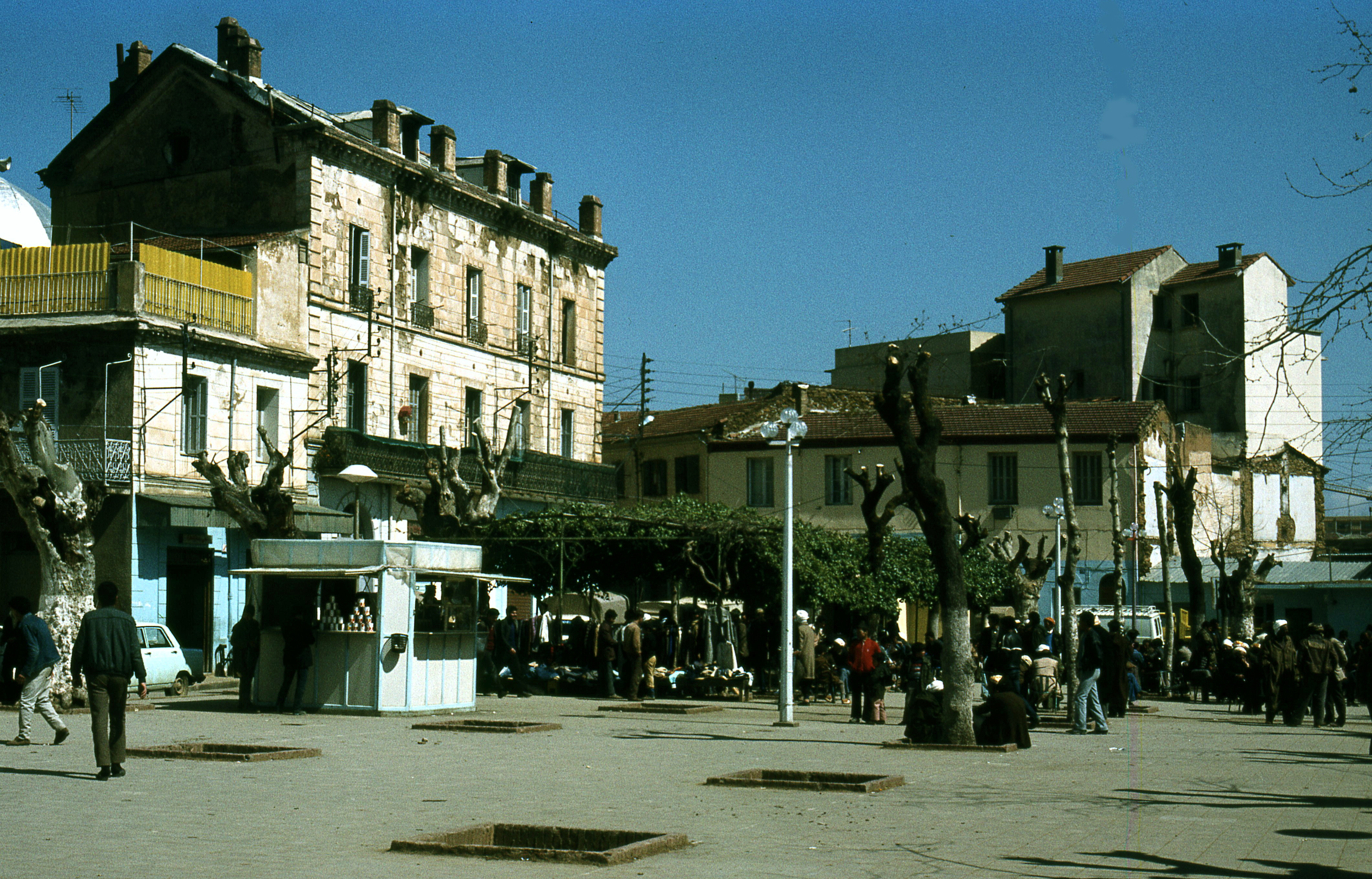 Médéa, Algeria